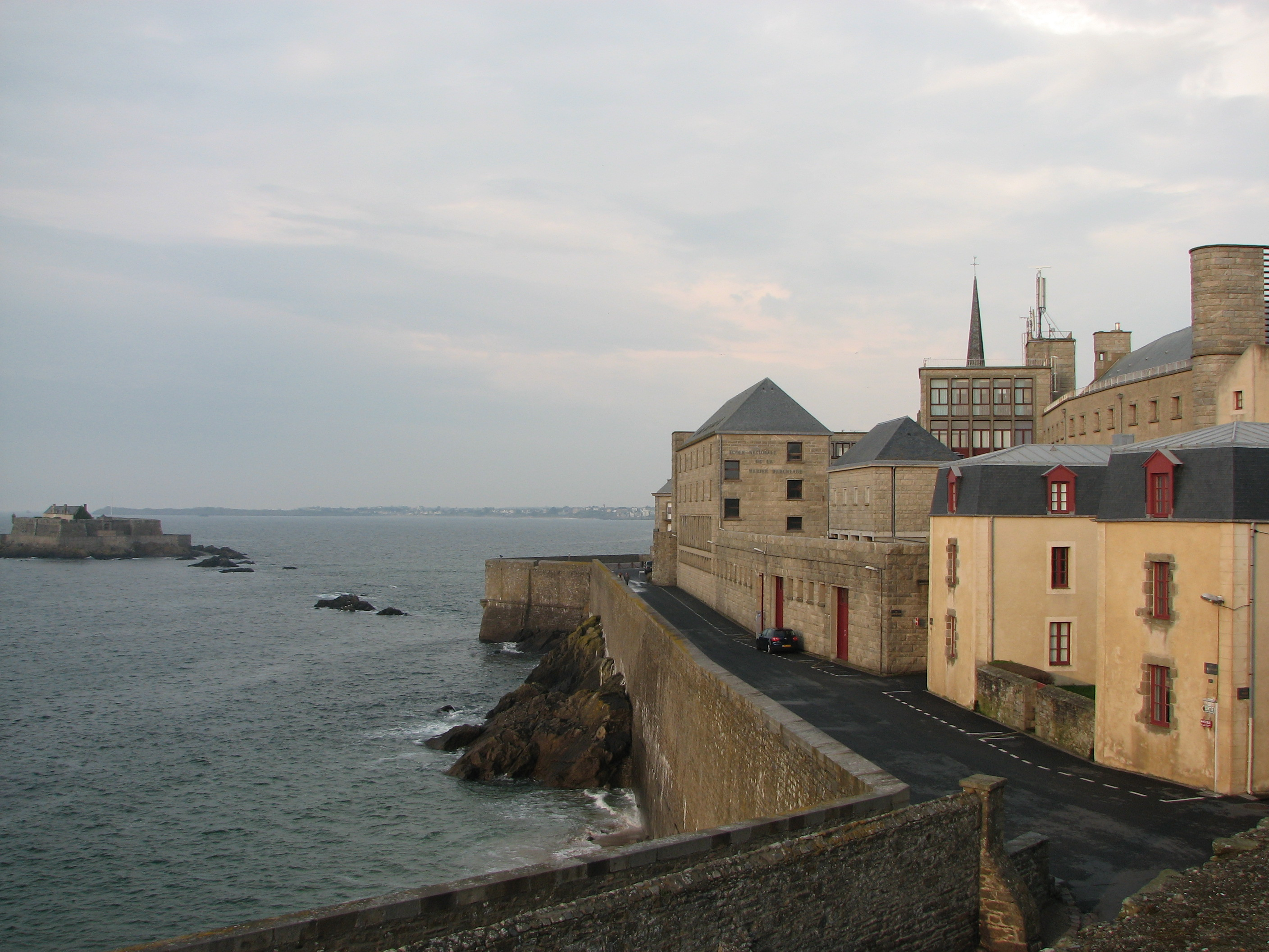 école nationale de la Marine marchande de Saint-Malo sur les remparts de la ville, à gauche, le Fort National